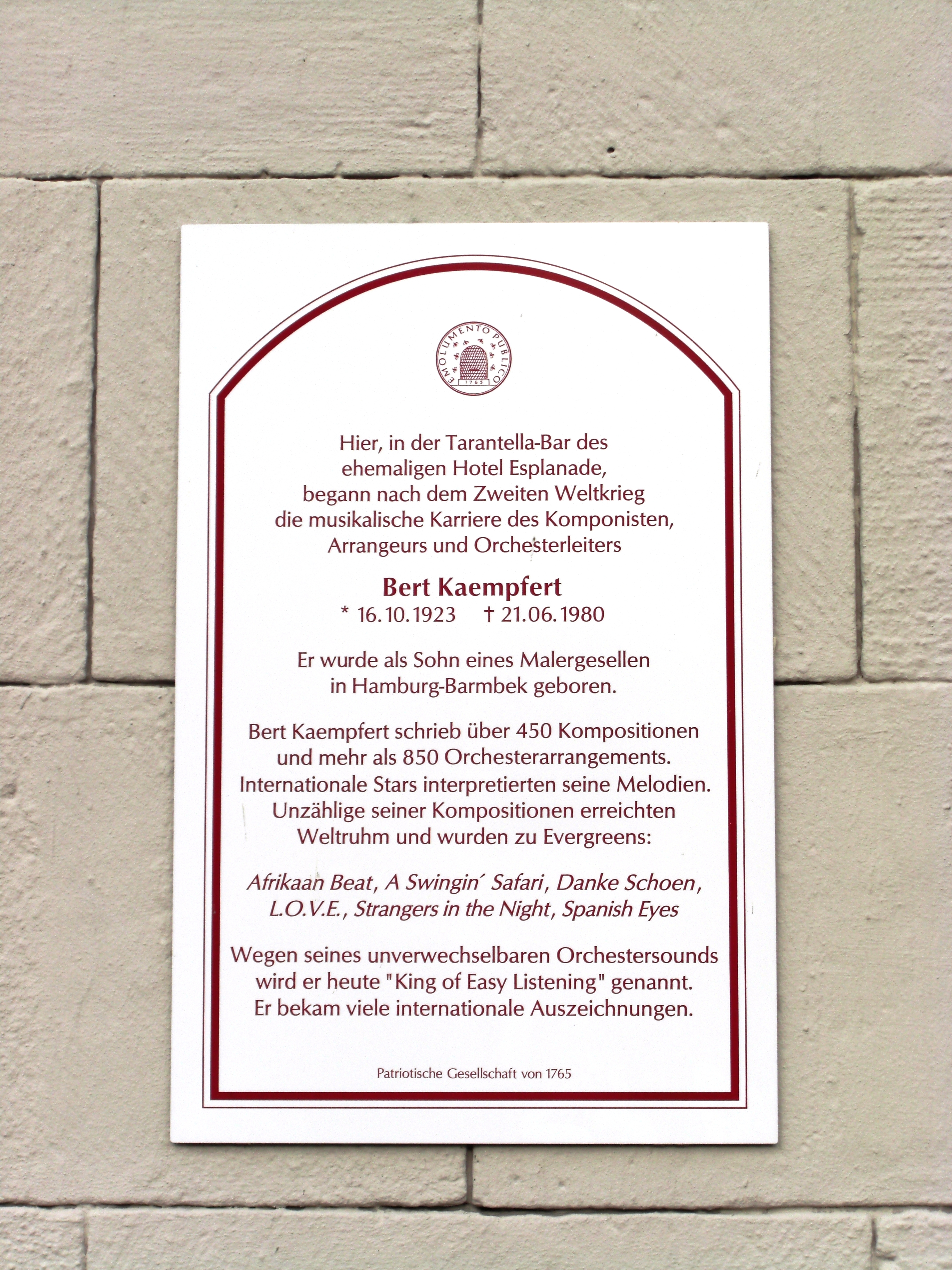 Erinnerungstafel für Bert Kaempfert (1923-1980), Orchesterleiter, Musikproduzent, Arrangeur und Komponist; Hamburg-Dammtor, Esplanade